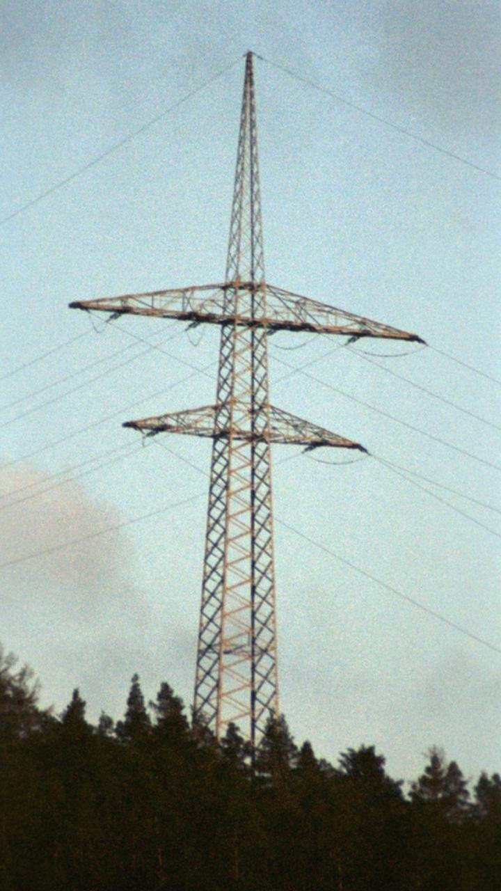 Abspannmast (umgekehrter Donaumast) am Südende der Eyachtal-Überspannung (Mast 15 der Anlage 615, 110 kV) in Höfen an der Enz, Landkreis Calw